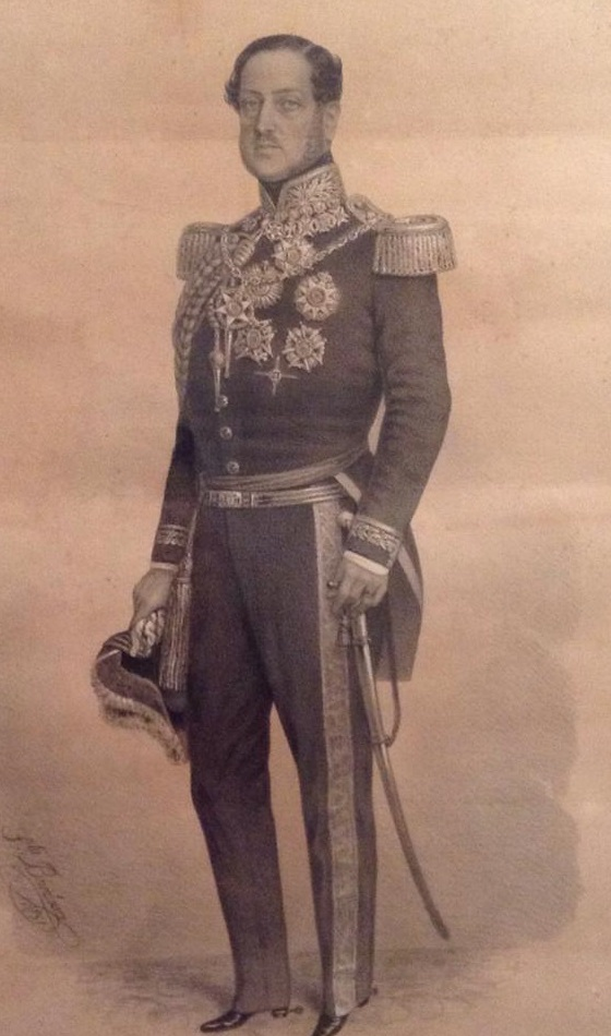 Retrato do Visconde de Pinheiro